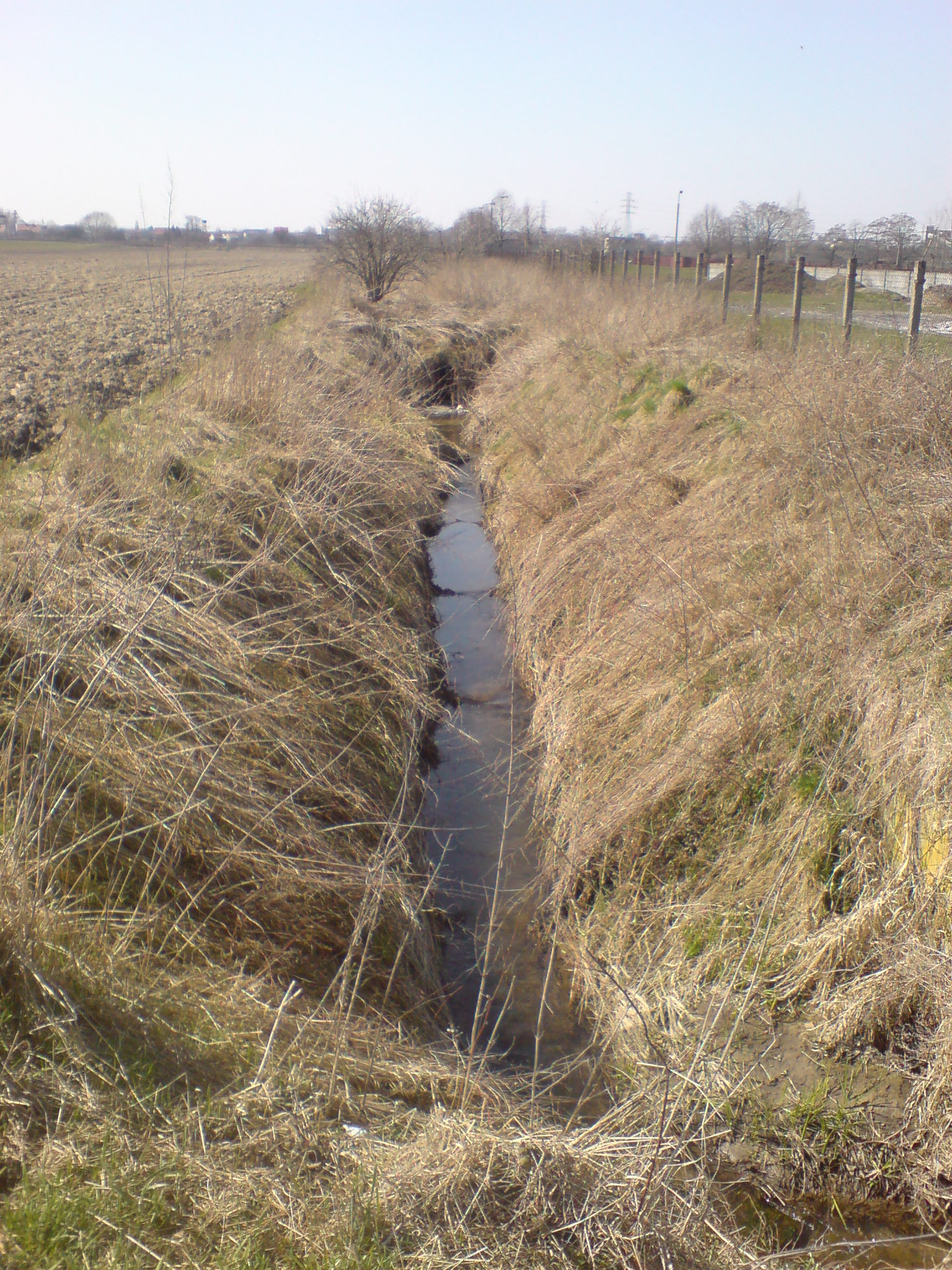 Psinka, zdjęcie wykonane niedaleko ujścia do Odry